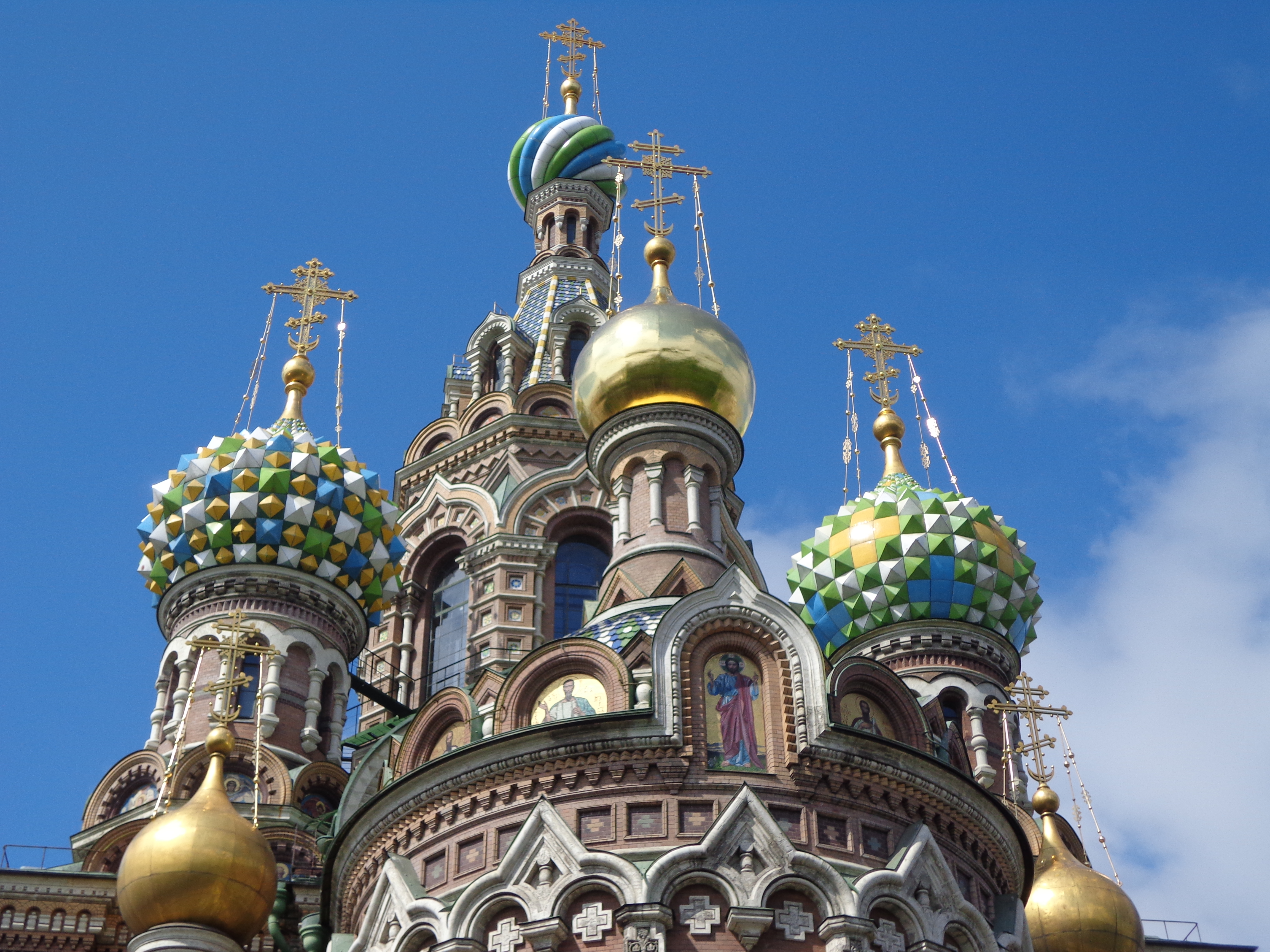 Собор Воскресения Христова («Спас на крови») (Санкт-Петербург и Лен.область, Санкт-Петербург, канала Грибоедова наб., 2-а)